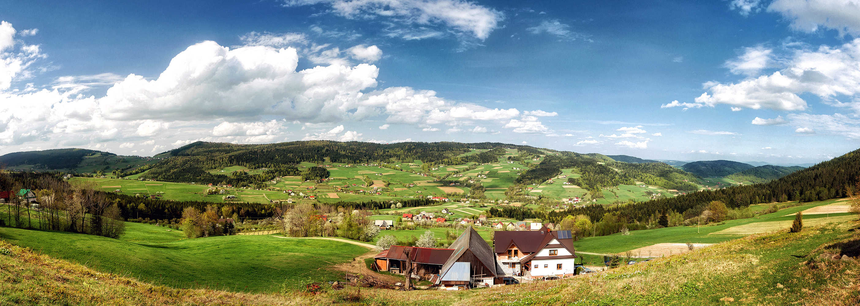 Zdjęcie wykonane wiosną 2013 roku.